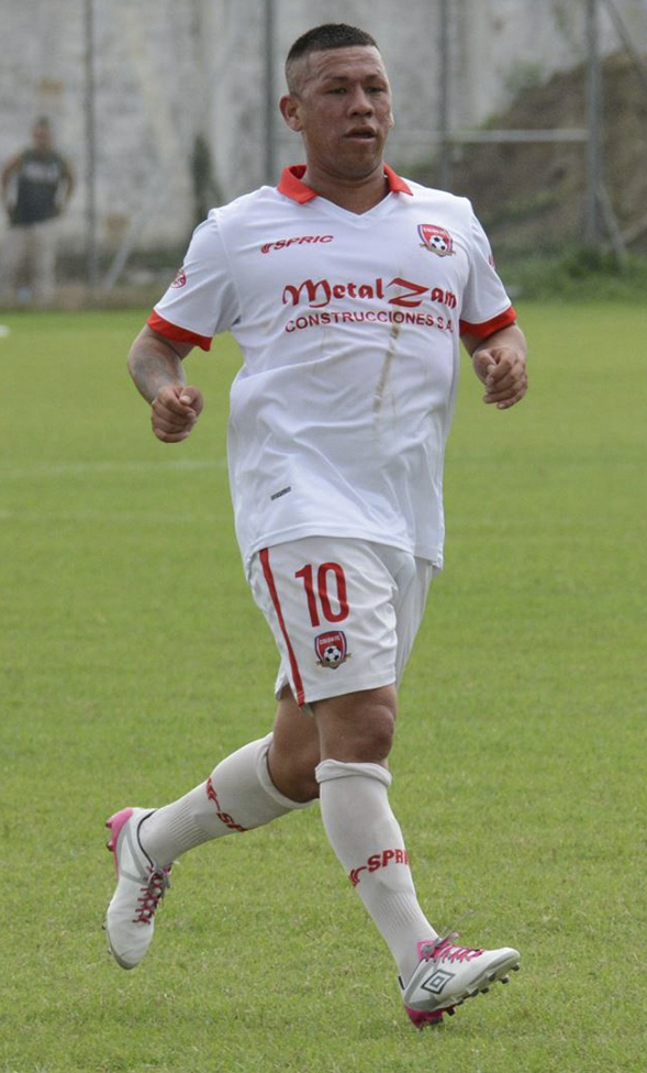 Victor Valle jugando para Colón FC en el 2015